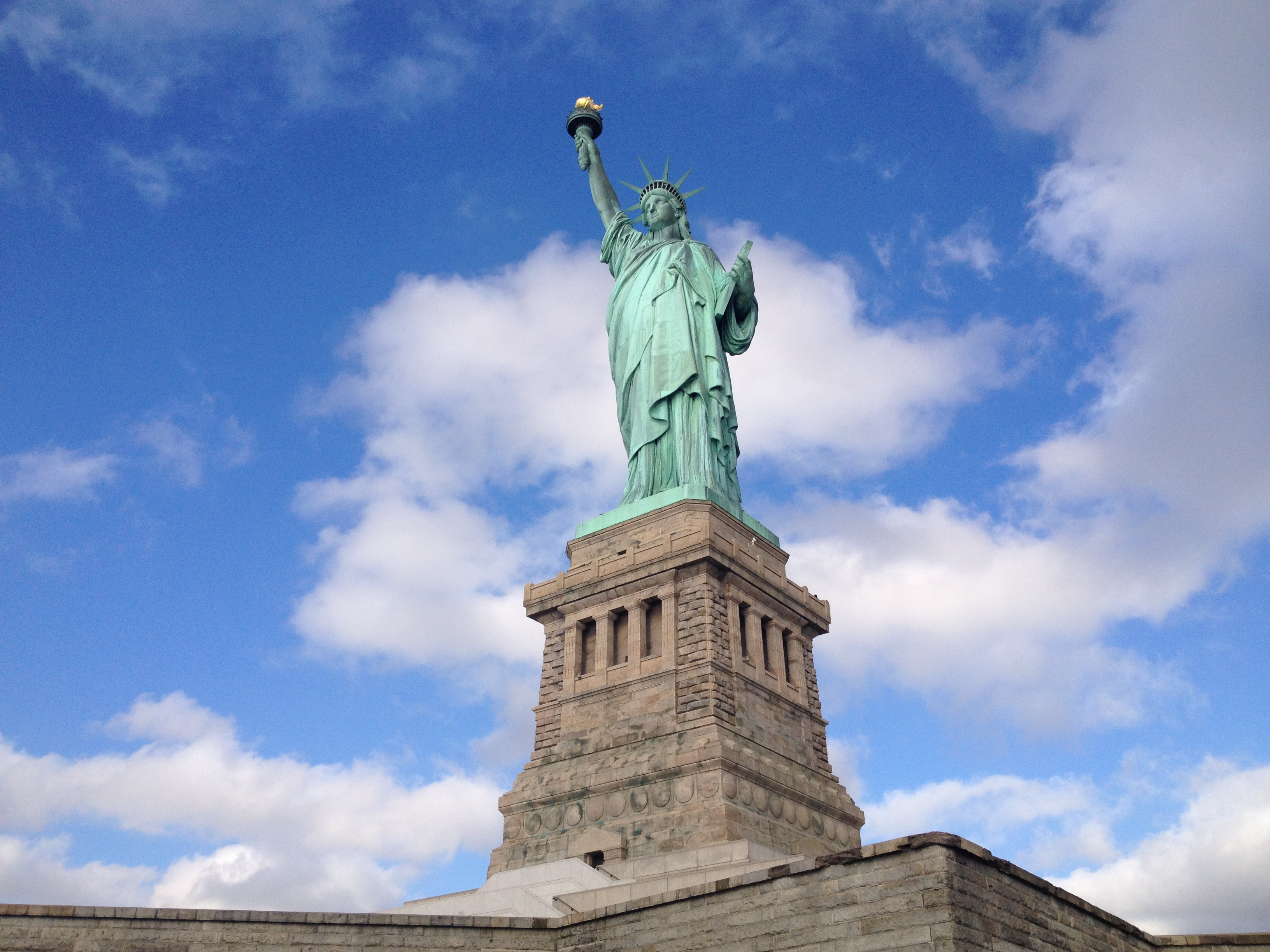 Lady Liberty